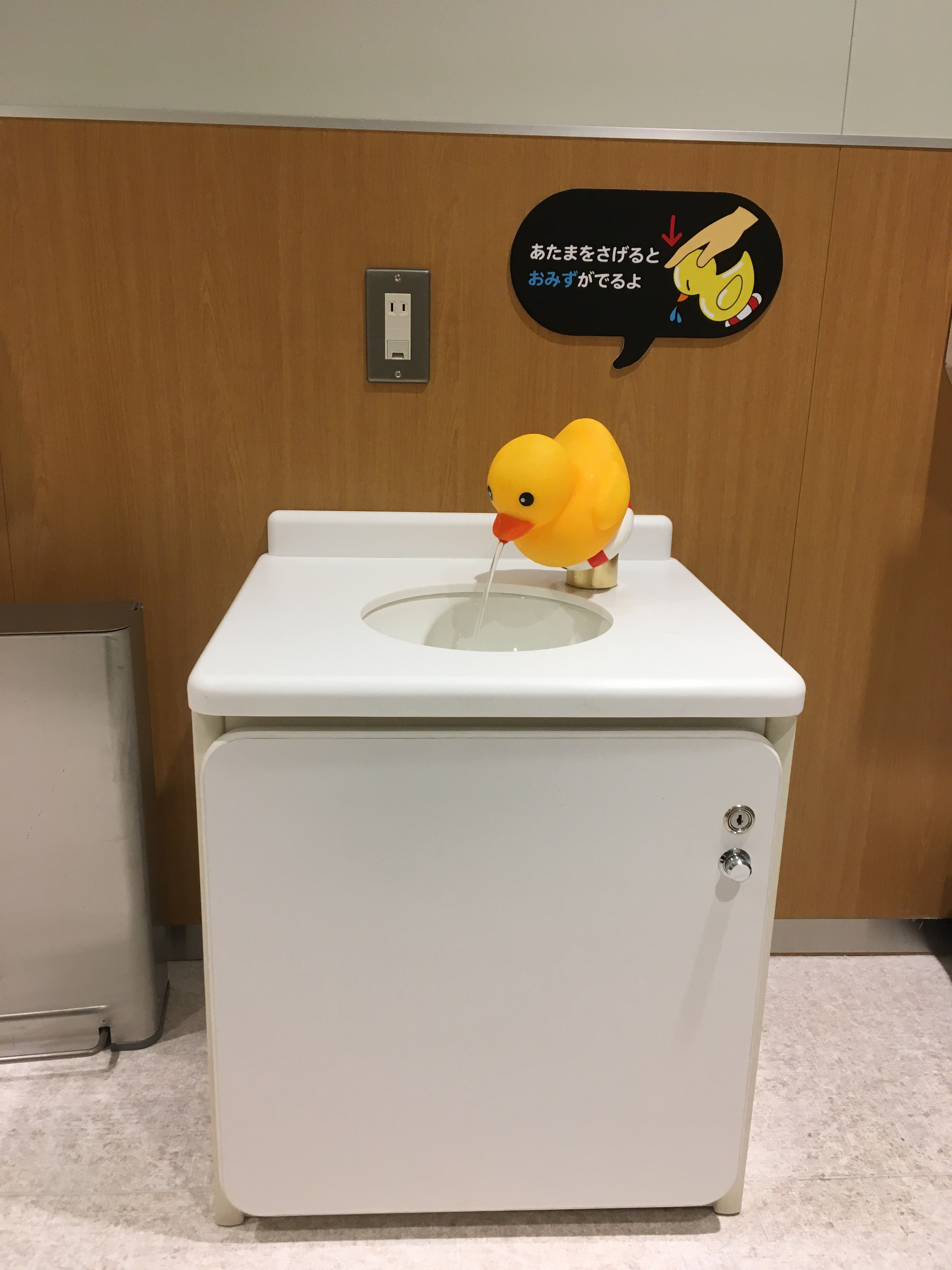 親子トイレに設置された幼児用洗面台